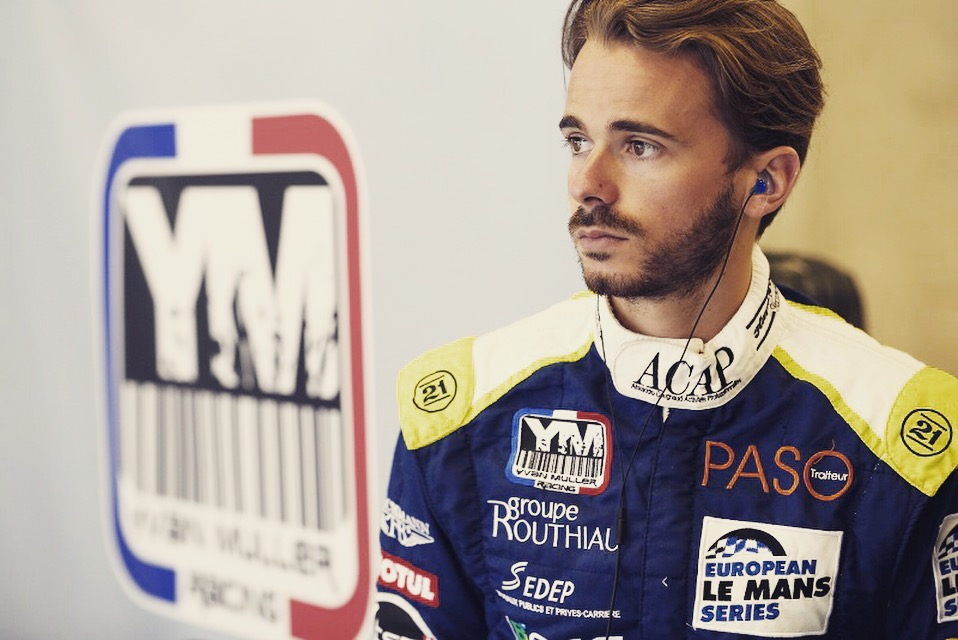 Alex saison 2016 YMR